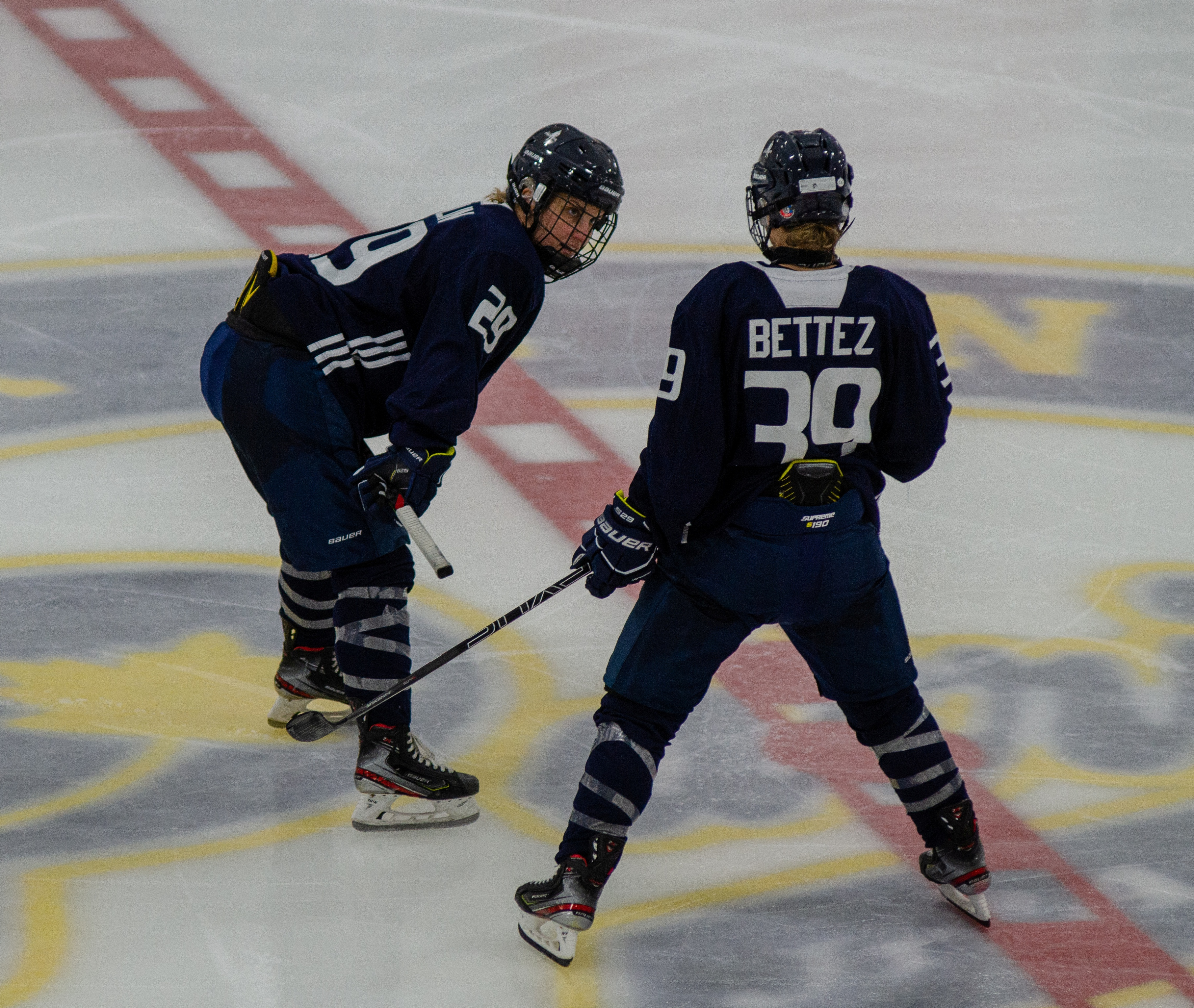 Нападающие Мари-Филип Пулен и Энн-Софи Беттес во время матча Dream Gap Tour 21 сентября 2019 года